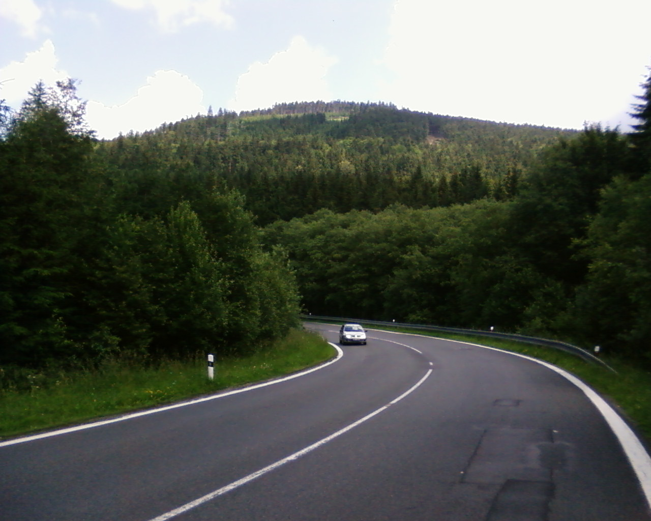 Widok koło miejscowości Klepáčov na górę Ztracené skály